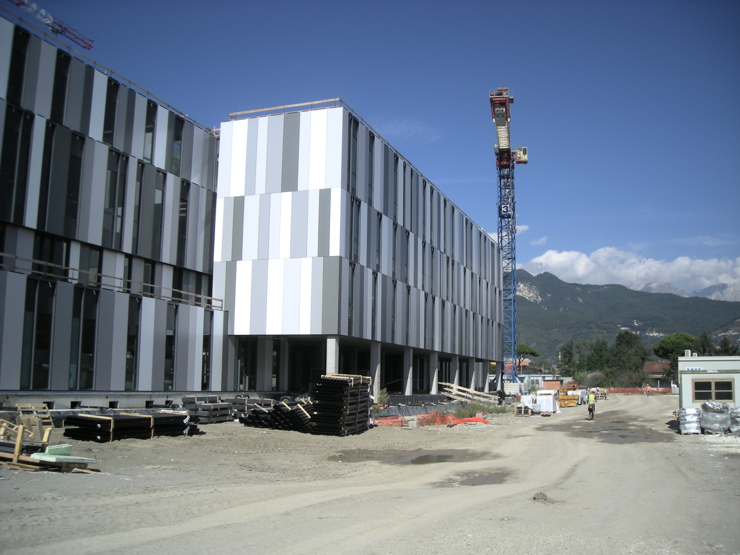 Foto scattata il 21 Settembre 2012